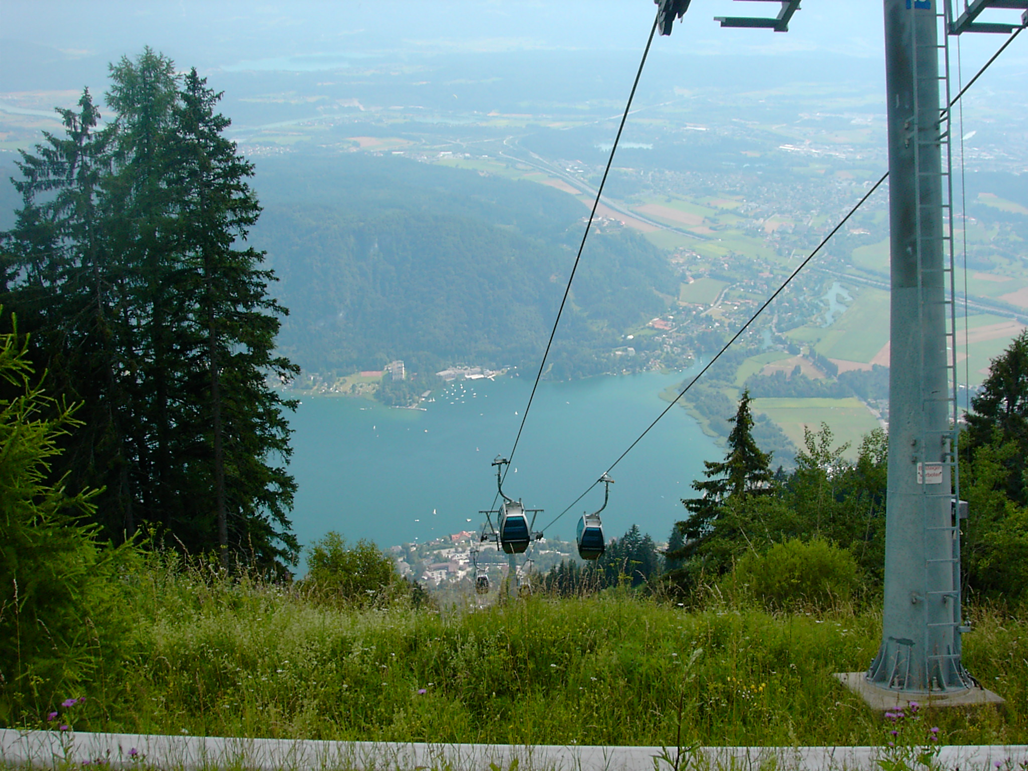 Beschreibung: Blick von der Gerlitzen auf den Ossiacher See, rechts oben der Oswaldibergtunnel und dahinter die Abfahrt Ossiacher See.